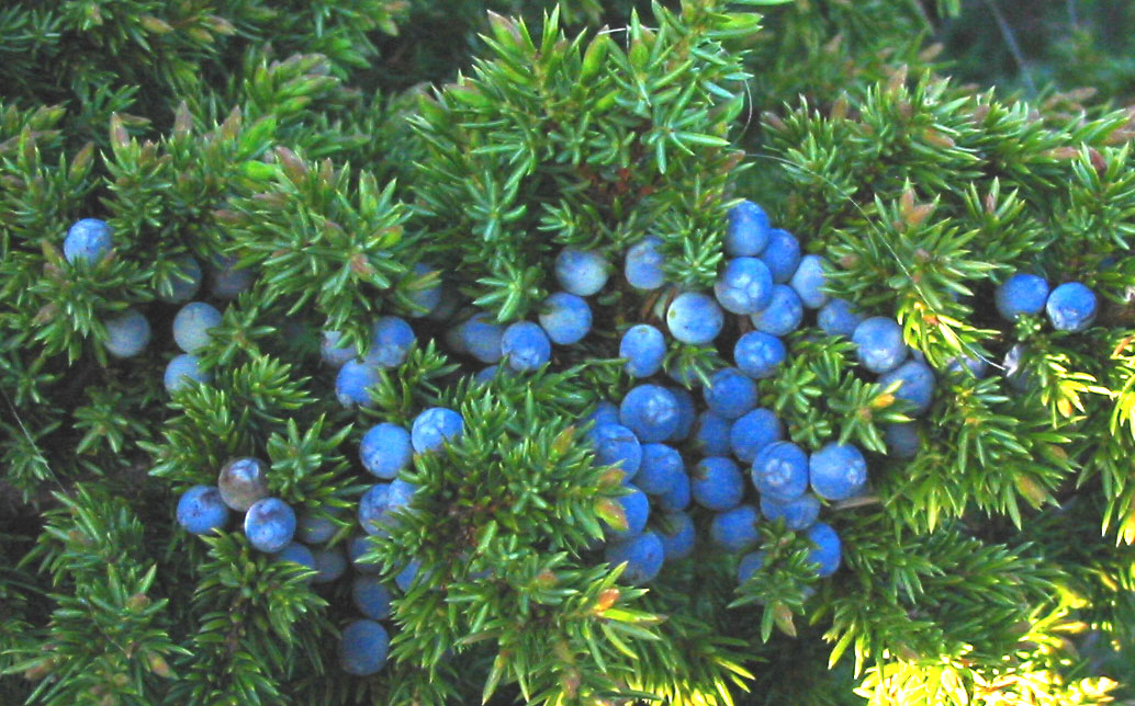 Kadakamarjad